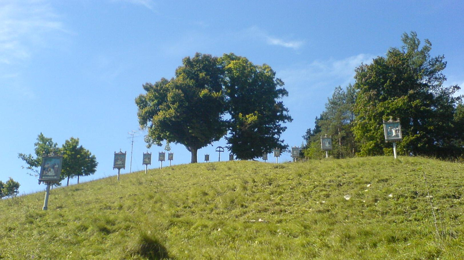 Kreuzweg in Titting (Oberbayern)